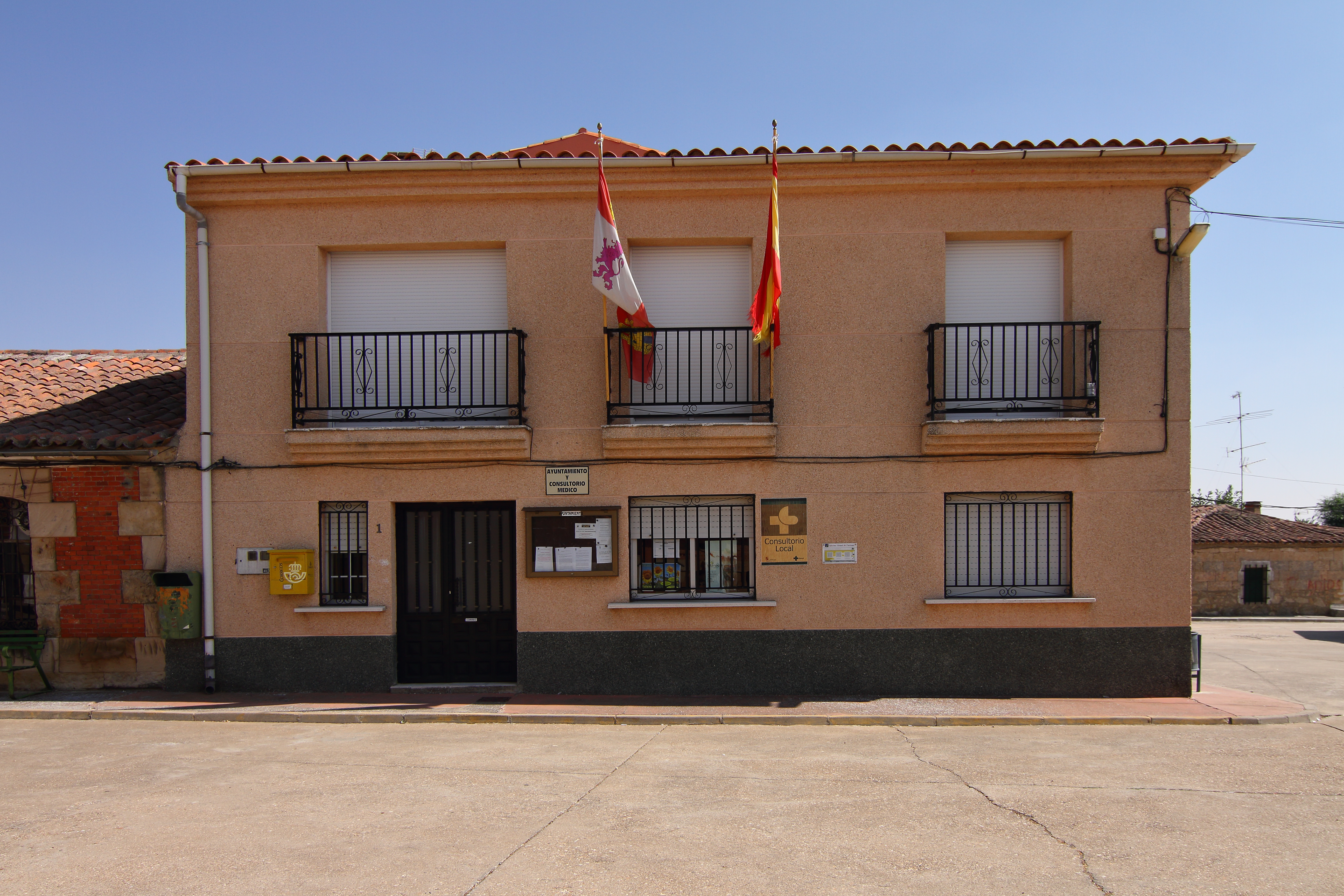 Ayuntamiento de Negrilla de Palencia